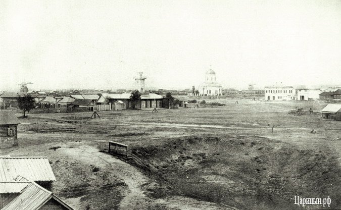 Городская площадь Царицына (ныне - площадь Павших борцов), в 1870-х годах